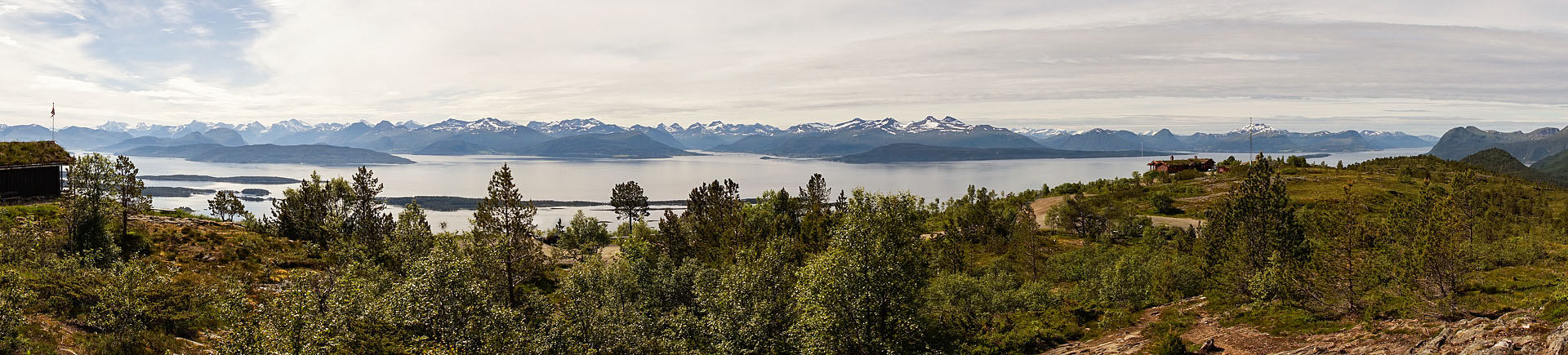 Panorama vom Varden aus mit 222 teils schneebedeckten Gipfeln